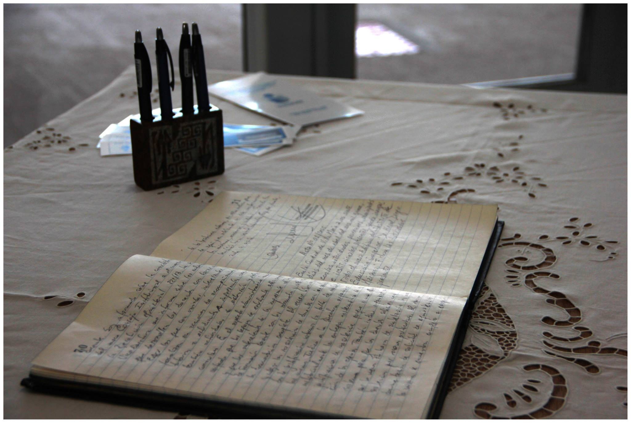 Acta inauguración edificio